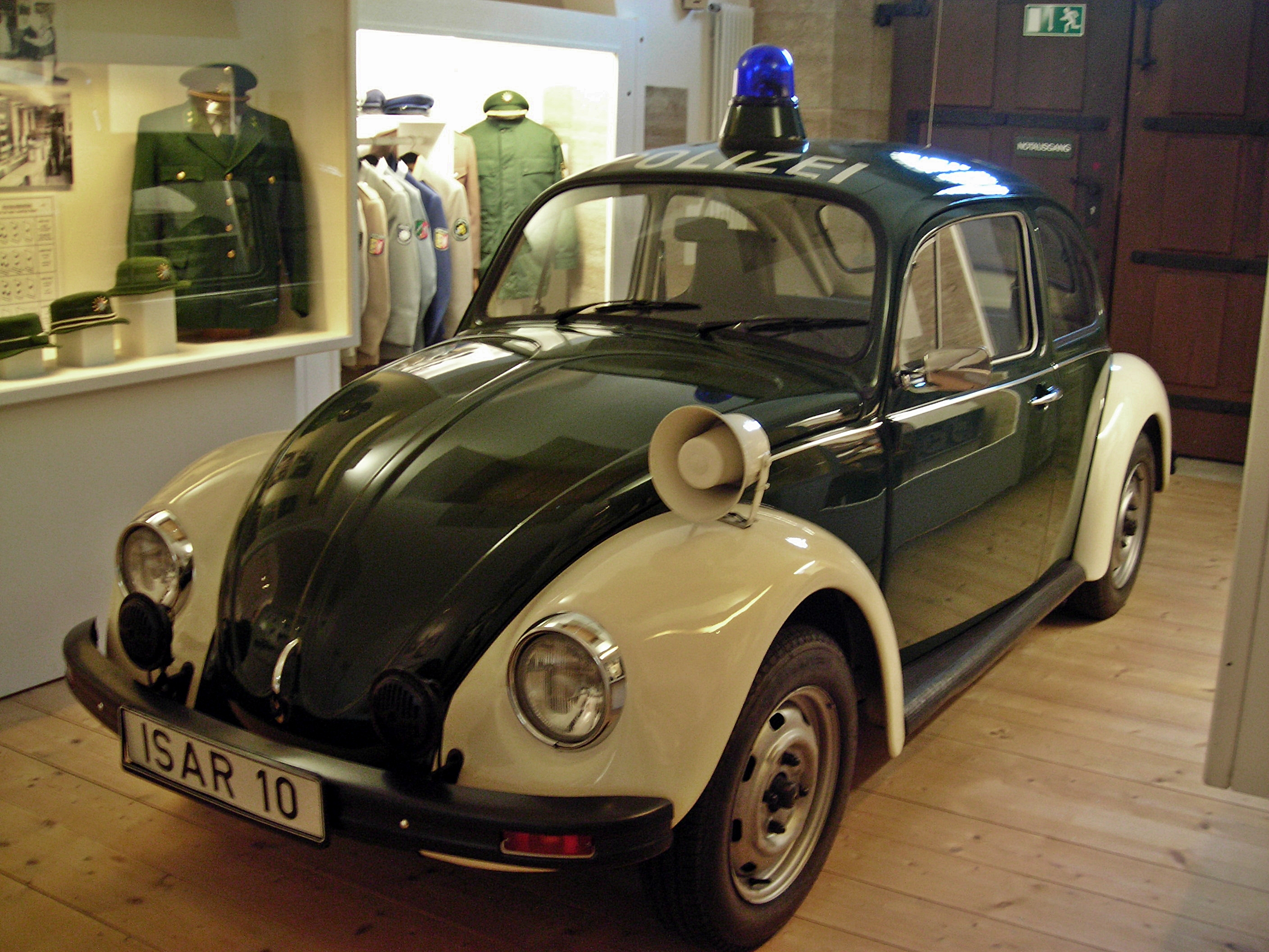 Volkswagen Typ 11 (VW Käfer) als Streifenwagen, im Dienst von 1976 bis 1987 beim Polizeipräsidium München (Funkrufname "Isar 10") - Exponat der Sonderausstellung 60 Jahre Bayerische Polizei in Ingolstadt